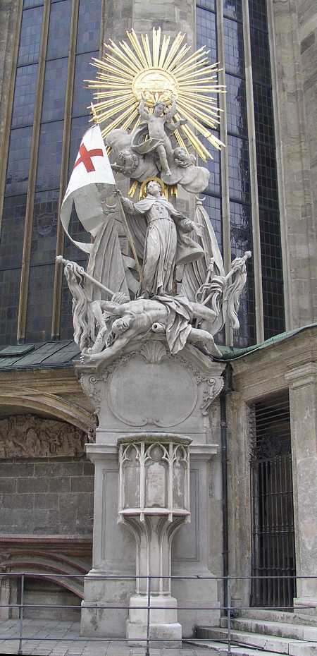 Capistrankanzel, Stephansdom in Wien; Pulpit of Giovanni da Capistrano († 1456) in Vienna